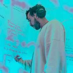 René cano, compositor colombiano (Yo te lo dije, Ay vamos, Ginza, Otra vez, Borro Cassette) Ganador Latin Grammy 2014, 2018